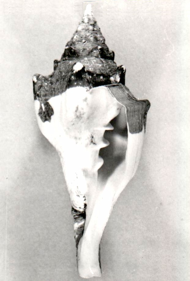 Pleuroploca gigantea del Golfo de Venezuela, estado Zulia.